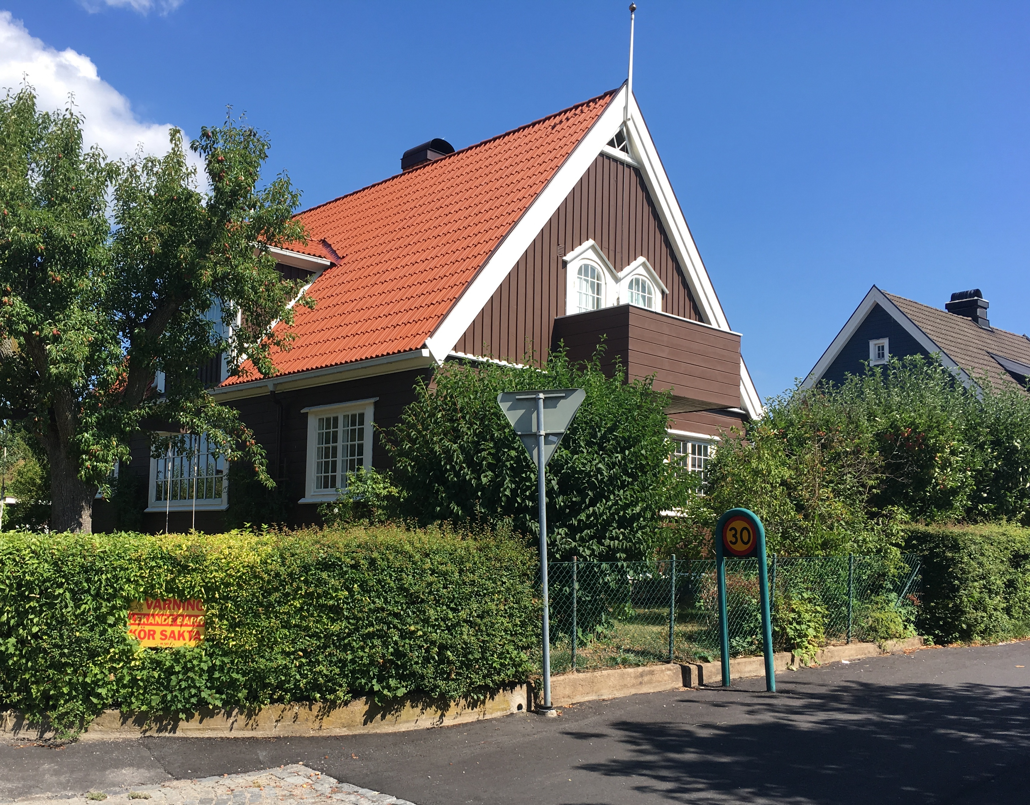 Övre Brunnsvägen 21 i Ronneby. Villan ritades av Gunnar Asplund för överbanmästare Johanssons första villa. Denna villa ritades på uppdrag av Wahlmans arkitektkontor där Asplund arbetade under studietiden. Han ritade sedan på eget uppdrag villan på Övre Brunnsvägen 17 - den s.k. Asplundvillan.